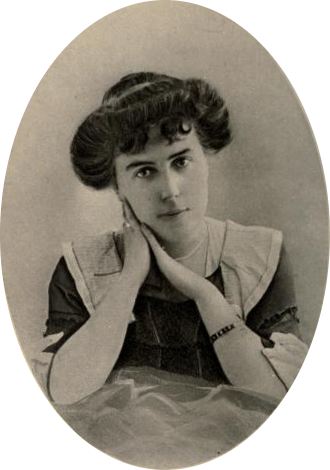 Portrait de Marie Lenéru à 37 ans (en 1912) [1] page 134 (environ) publié en 1922 par les éditions G. Crès et Cie, pour le Journal de Marie Lenéru.